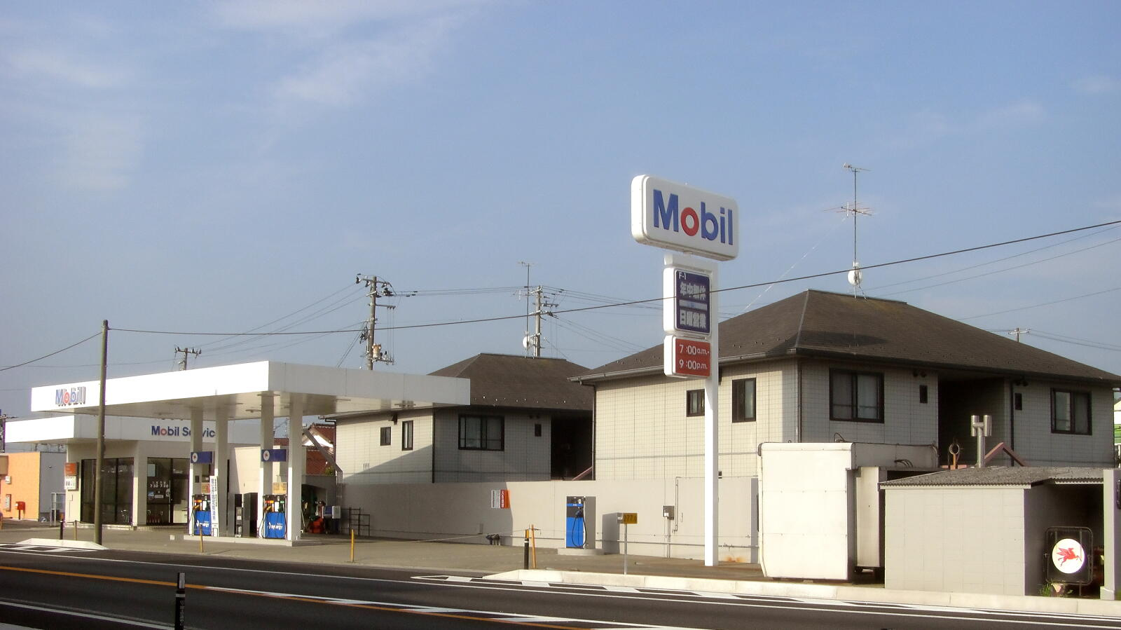 モービル国道SS (南相馬市)